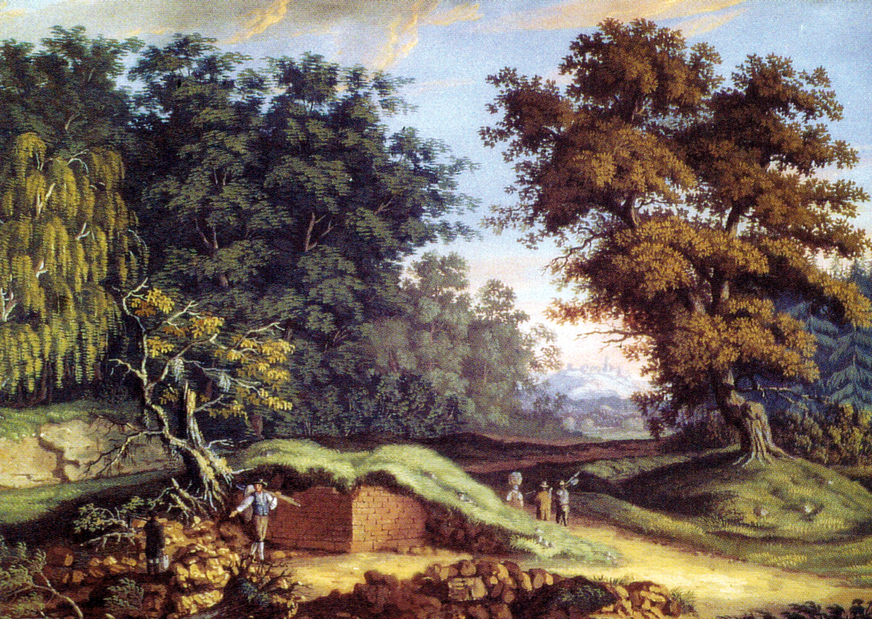 Aquarell von Christian Kehrer mit der Darstellung der Freilegung des Steinturms der Turmstelle 10/32 am Odenwaldlimes. Rechts erkennbar, der Ringgraben und der mit einem Baum bewachsene Schutthügel des noch nicht ergrabenen Holzturms